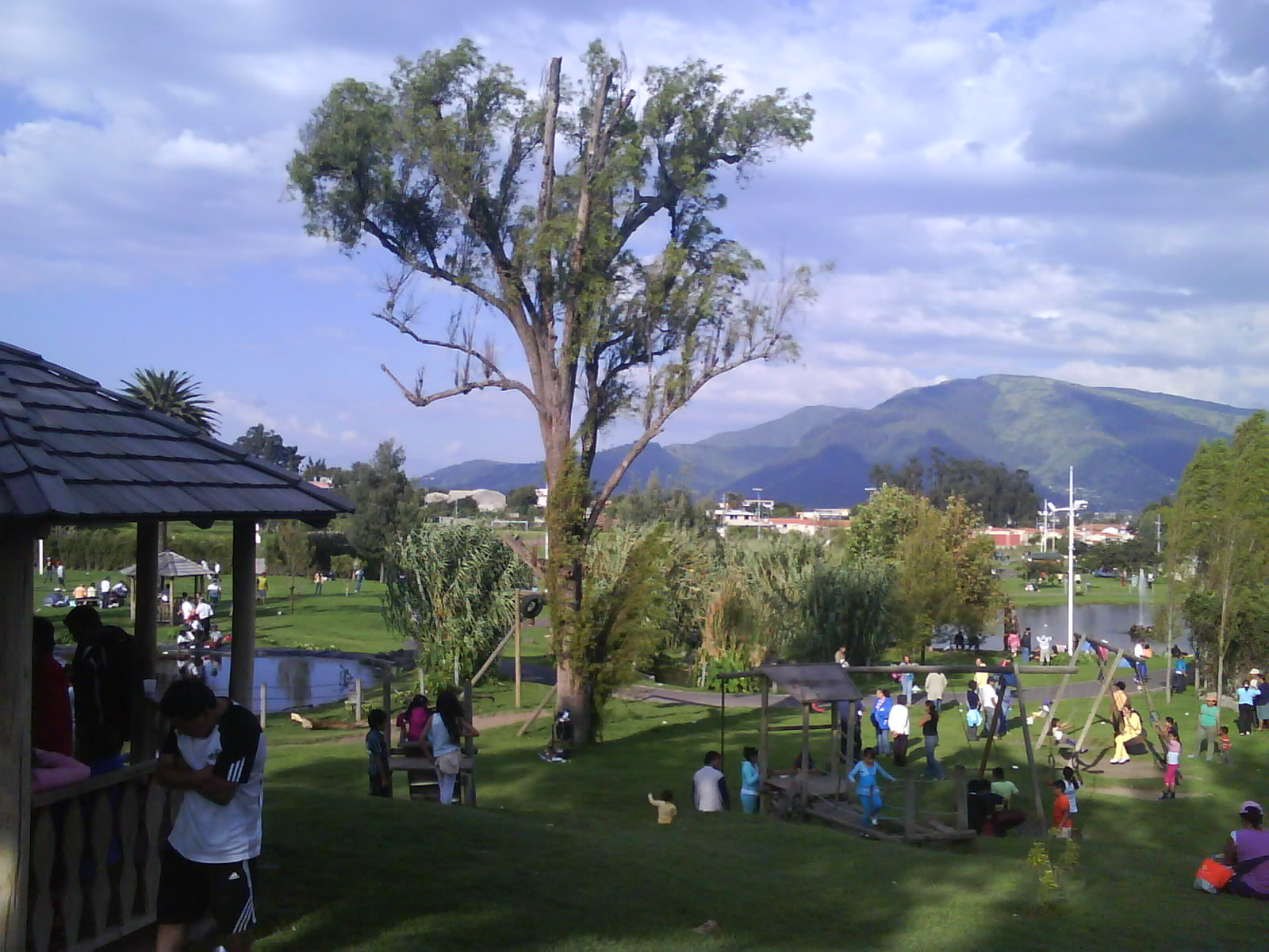 El parque antiguamente descuidado es ahora uno de los lugares turísticos de la parroquia rural de Quito Conocoto ubicada en el valle de los chillos, una zona residencial.